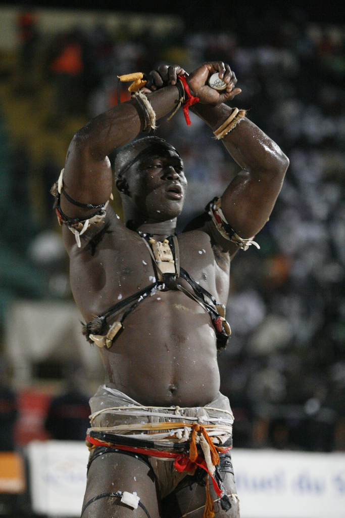 Le lutteur Balla Gaye